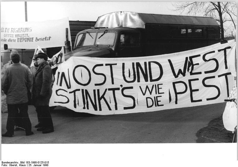 ADN-ZB Oberst 25.1.90 Bez. Potsdam: Mülldeponie- Umweltschützer aus den Gemeinden Kallinchen, Schöneiche und Gallun blockierten den Zugang zur Mülldeponie Schöneiche im Kreis Zossen. Sie forderten den Stopp der Müllimporte aus der BRD und anderen europäischen Ländern sowie aus Berlin (West). Die Bürger verlangen weiterhin, daß die 1988 erbaute Hochtemperatur-Müllverbrennungsanlage nur betrieben wird, wenn ein unabhängiges Gutachten einen vertretbaren Schadstoffausstoß nachweist.